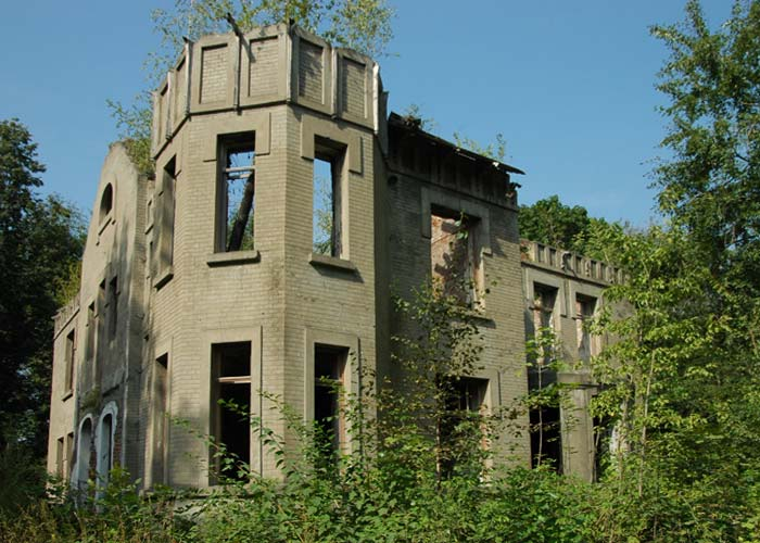 Коломна. Щурово. Дом Липгарта